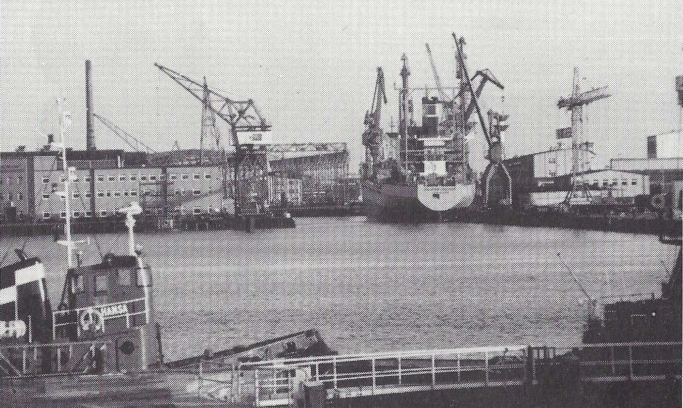 Seebeck-Werft am Handelshafen in Bremerhaven-Geestemünde. Im Vordergrund das Binnentor der früheren Schleuse zum Geeste-Vorhafen.